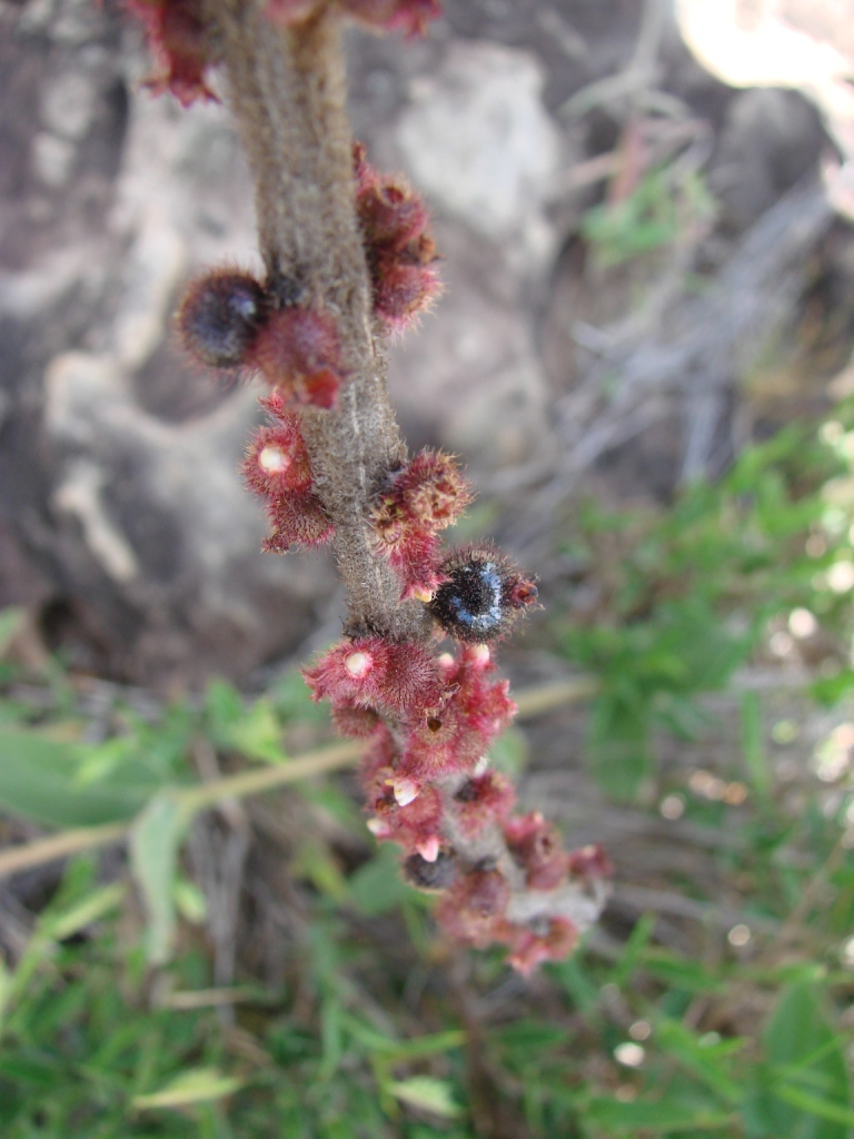 Clidemia rubra (Aubl.) Mart. - MELASTOMATACEAE - Chapada Imperial - Distrito Federal - Brasil.